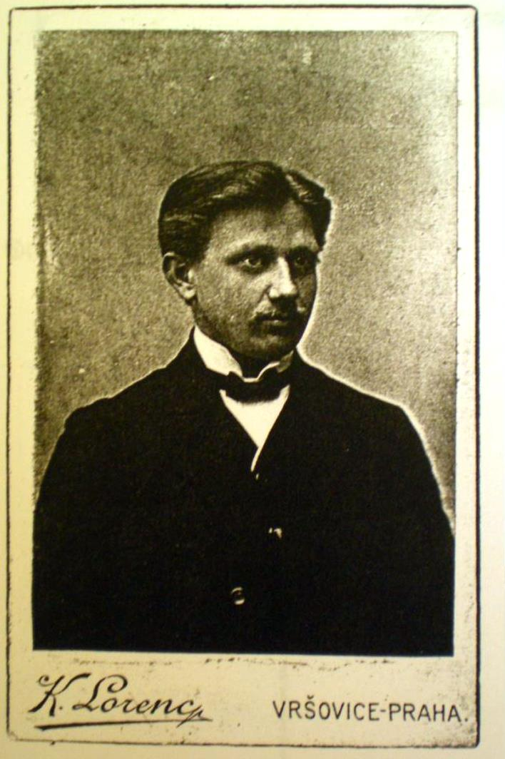 Hudební skladatel Adolf Kramenič (1889–1953) okolo roku 1909.